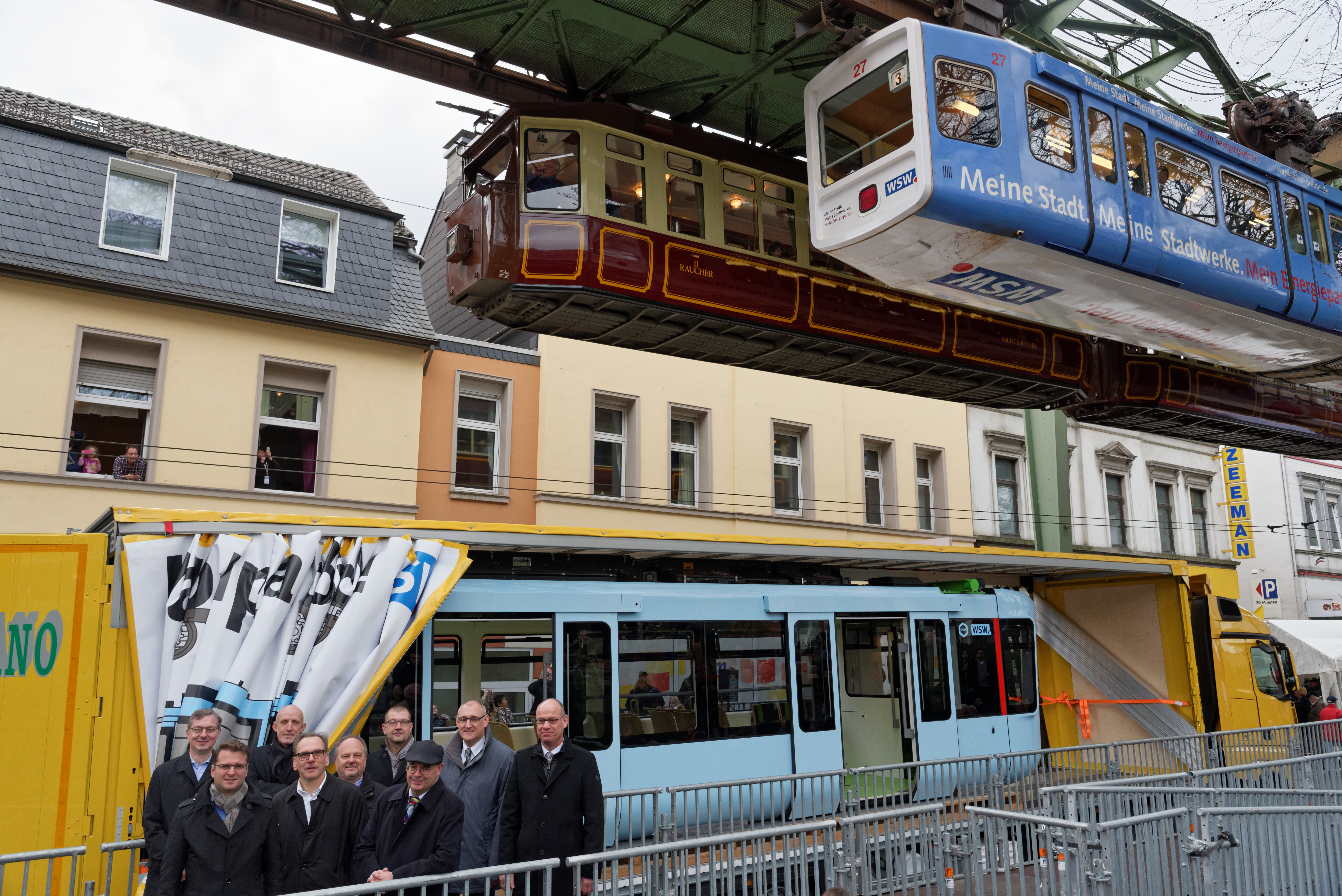 neue Schwebebahn von außen in Wuppertal